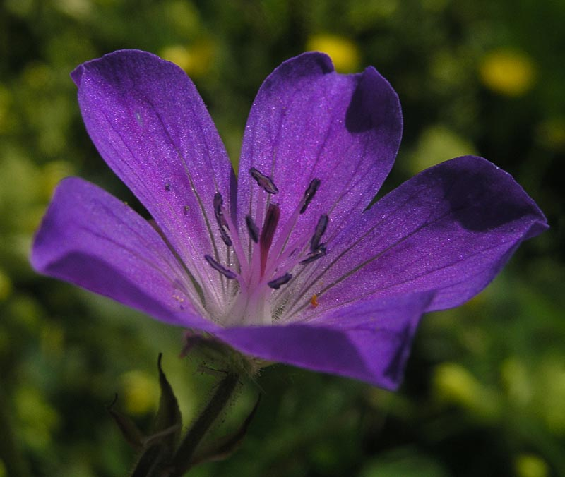 Storchschnabel (geranium), aufgenommen auf einer Blumenwiese im Stillachtal (Allgäuer Alpen)